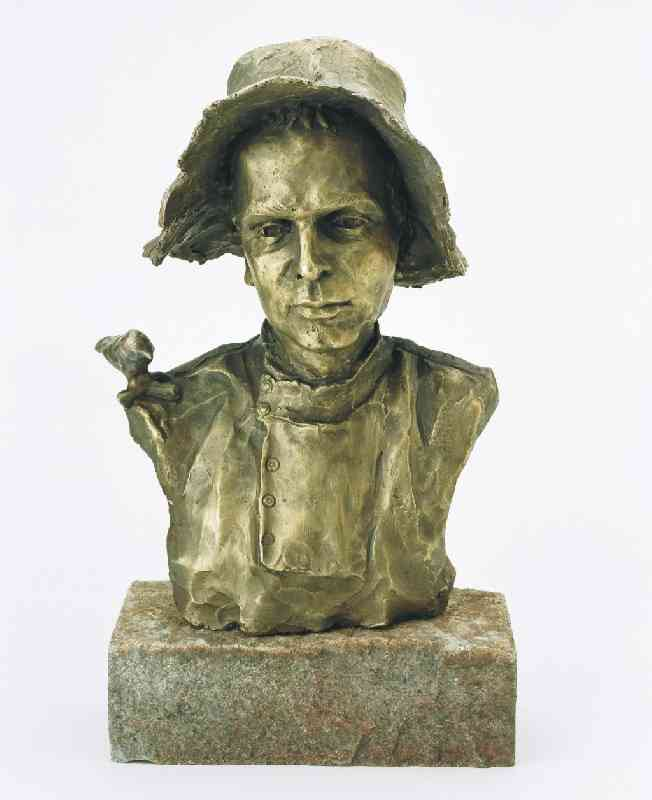 Popiersie Grzegorza Ciechowskiego wykonane przez Dorotę Dziekiewicz-Pilich, rzeźba z cyklu "Twarze Fryderyków", brąz 45 cm, 1997